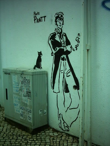 Grafito integrado no mobiliário urbano.